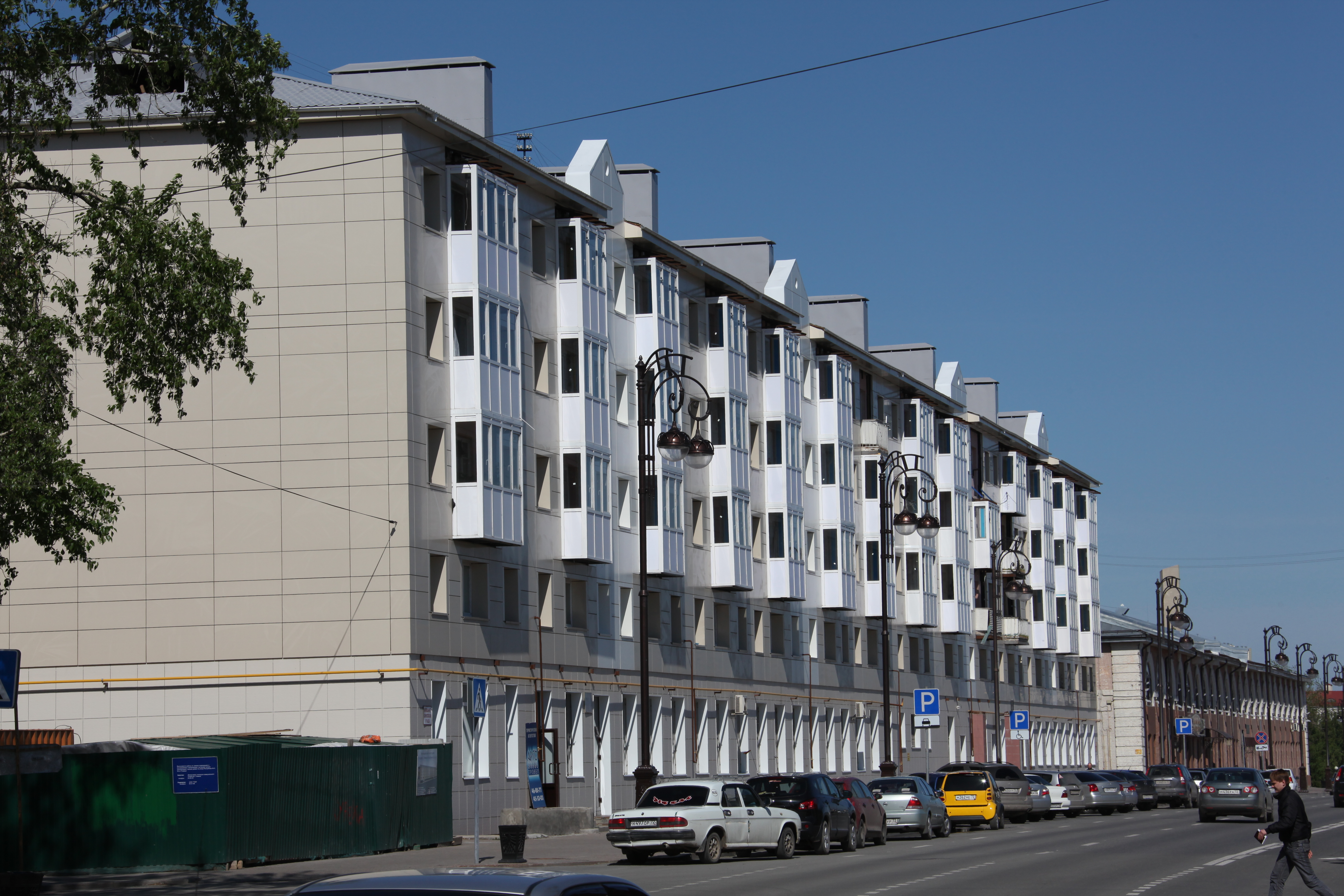 Domo en strato Respubliko 6. Tjumeno, Rusio.